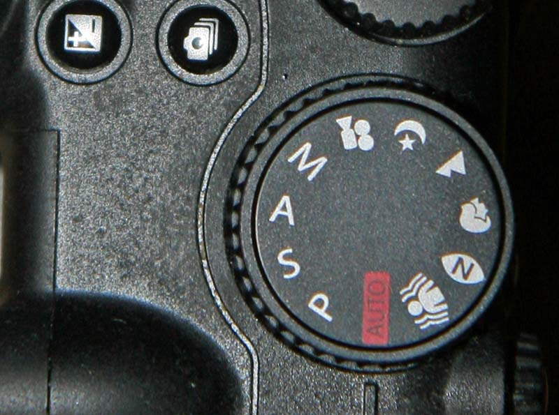 Exposure mode dial